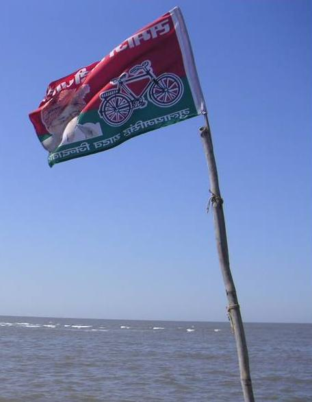 Samajwadi Partys fana. Mumbai 2004. Texten längst ner lyder "Mulayalamsingh Yadav Zindabad" (Leve Mulalayamsingh Yadav). Photo: Soman 31 oktober 2005 kl.11.54 (CET)